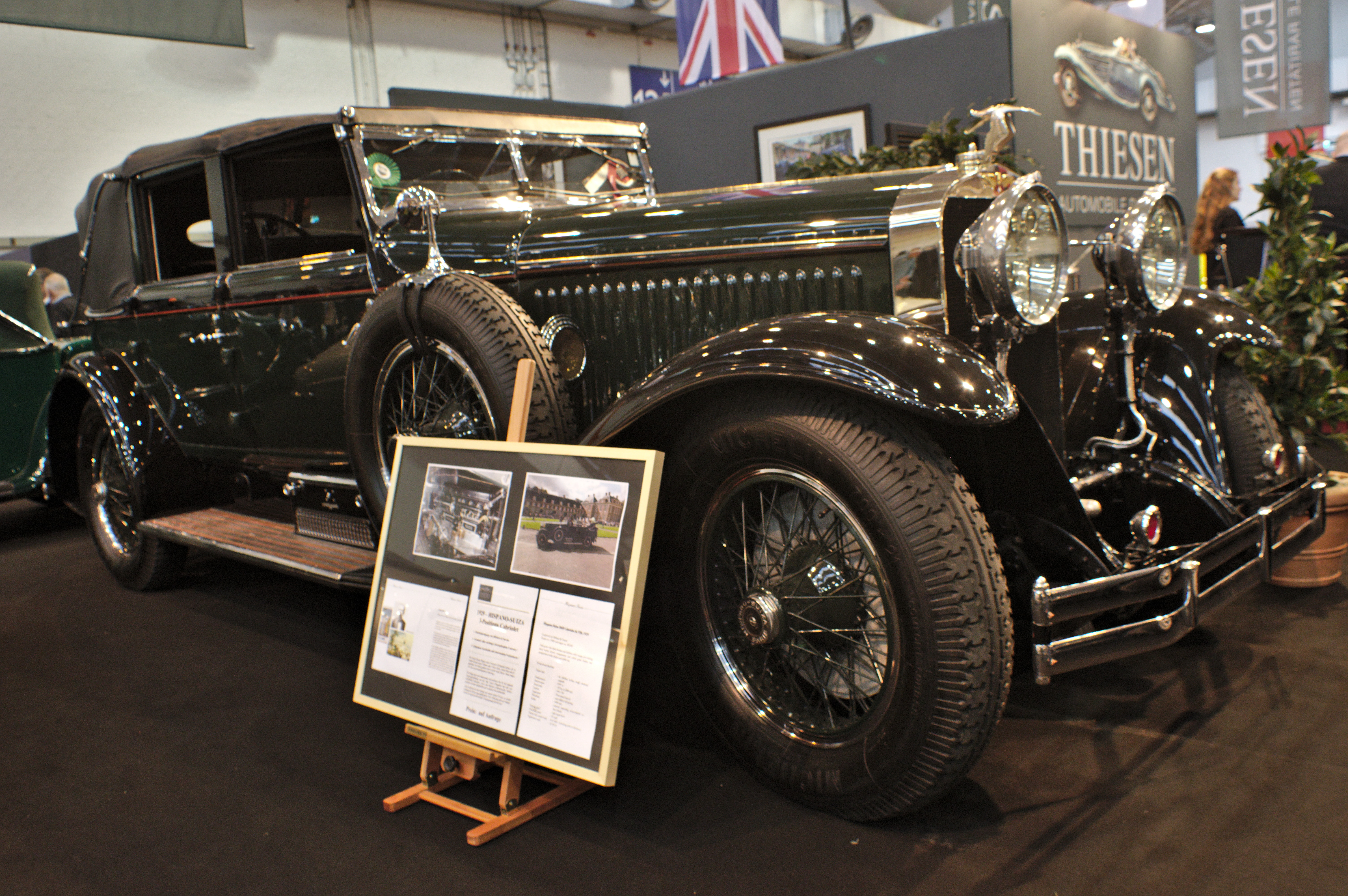 Techno Classica 2018